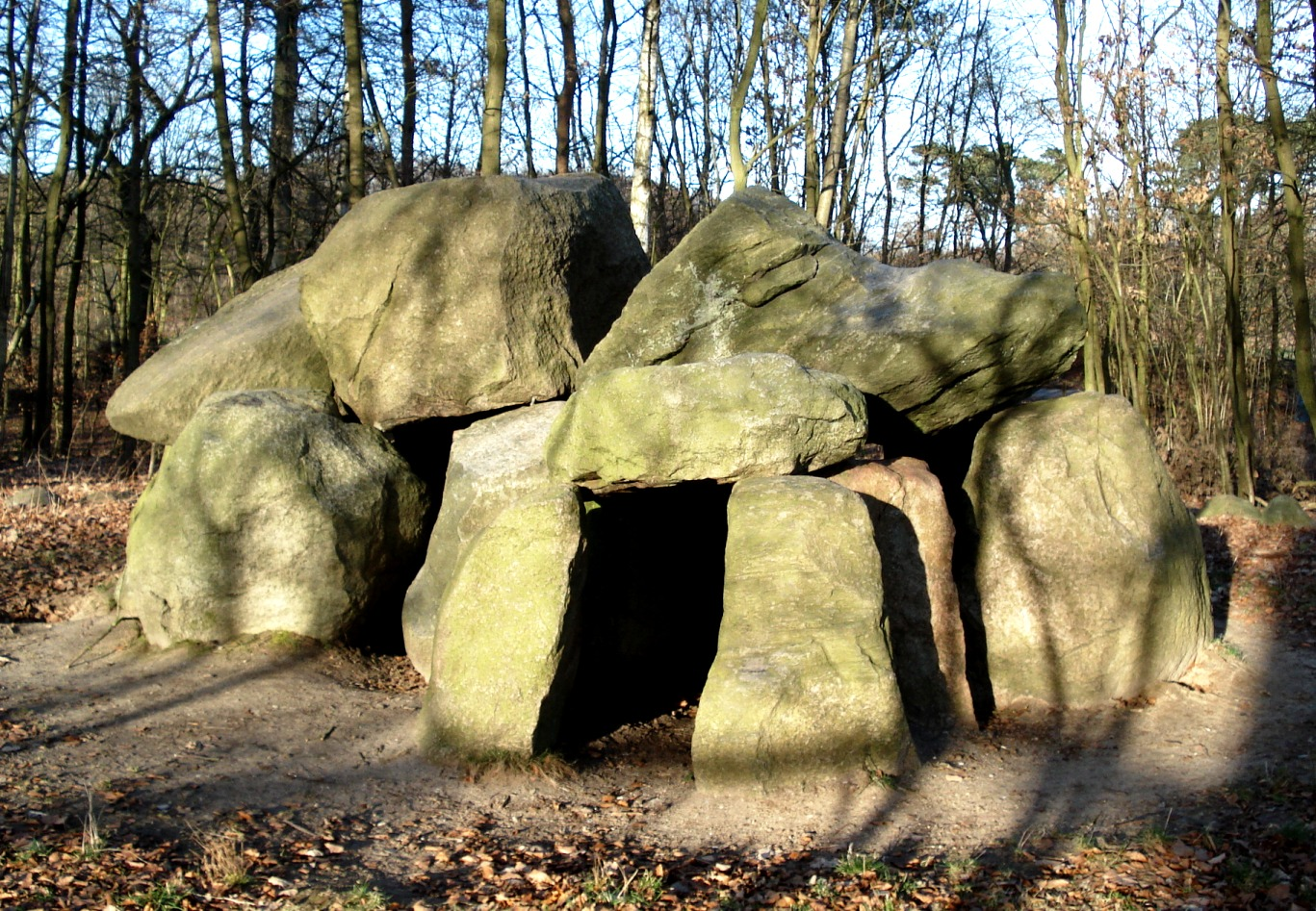 Grosssteingrab in Lübeck-Pöppendorf - aus West